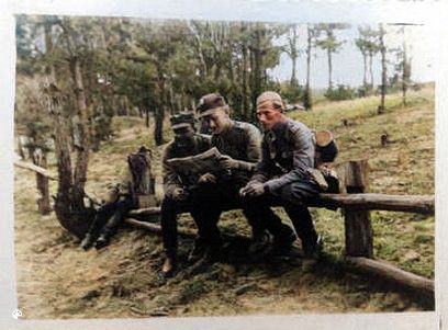 Letnie manewry 22 pułku artylerii lekkiej w 1937 r. W środku siedzi z mapą ogn. pchor. rez. art. Jarosław Heigel, we wrześniu 1919 r. dowódca II plutonu w 9 baterii III Dywizjonu. Koloryzacja zdjęcia - praca własna.